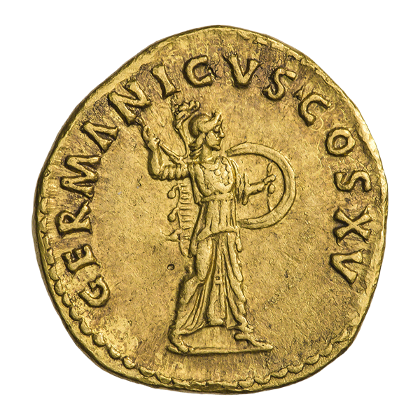 Домициан (81—96). Ауреус. Ок. 90—91 гг. Рим. Реверс. Надпись GERMANICVS COS XV. Минерва (богиня мудрости) стоит, вправо; в руках копьё и щит.